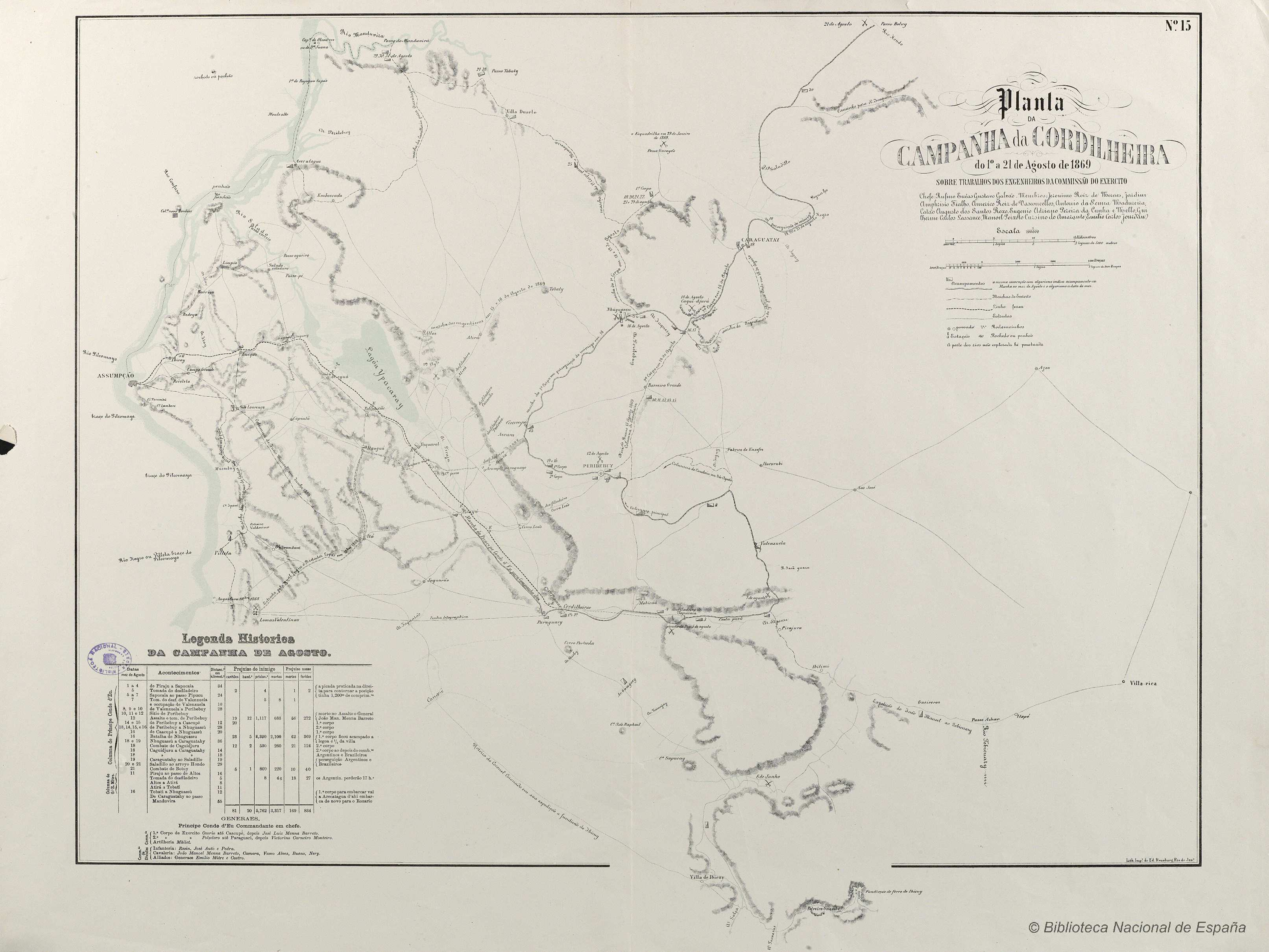 El mapa abarca toda La cordillera de los Altos, mazico montañoso entre los departamentos de Cordillera, Central y Paraguarí de la Republica del Paraguay, formando parte de la gran Meseta Brasileña. Se extiende desde el río Paraguay hasta las Serranías de Ybycuí. Entre sus estrivaciones y desfiladeros tuvieron lugar los enfrentamientos bélicos del mes de agosto de 1869 durante la Guerra del Paraguay.